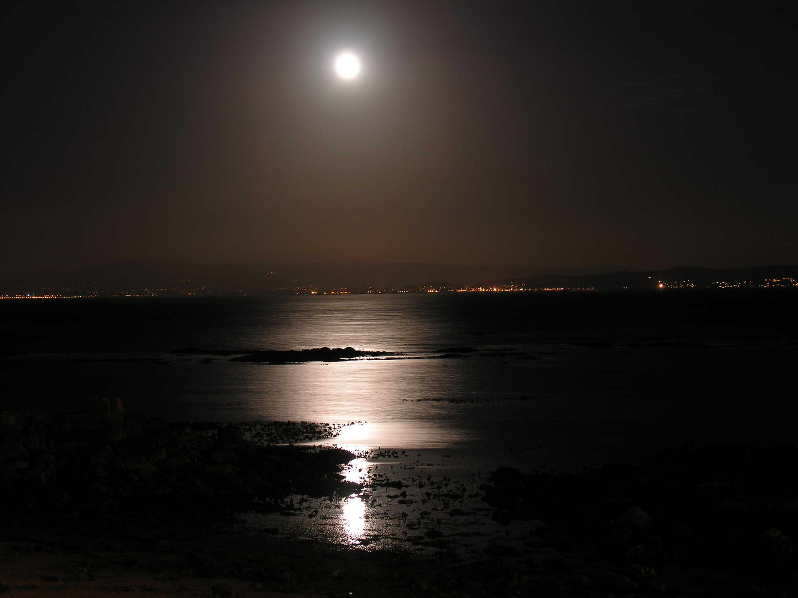 self made. Castiñeiras - Ribeira - Galicia - Spain